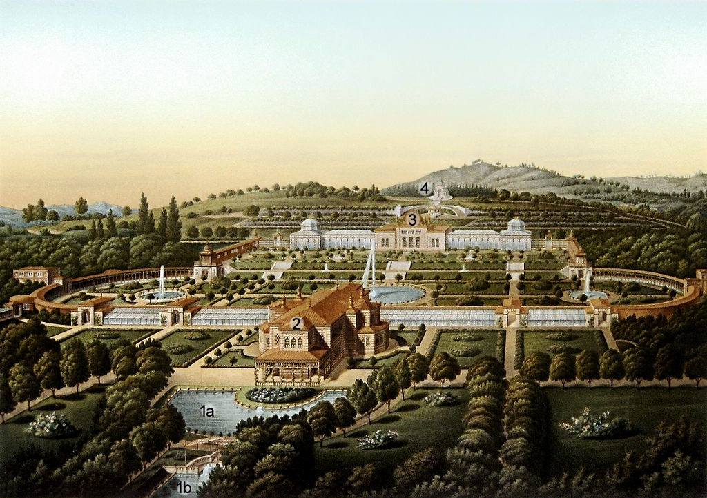 Ludwig von Zanth: Ansicht der Wilhelma von 1855.